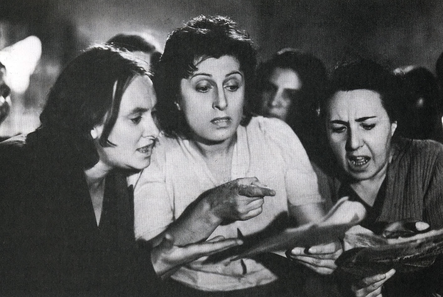 screenshot de L'onorevole Angelina (1947) di Luigi Zampa